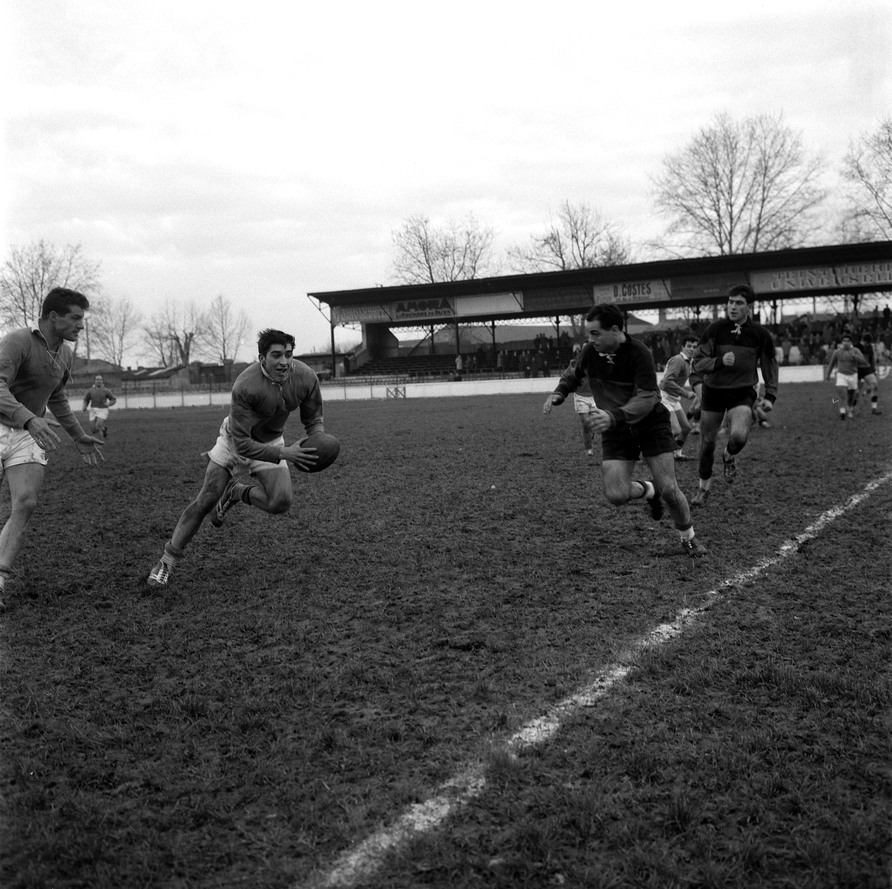 Stade Ernest Wallon. Le 28 Janvier 1962. Vue d'une phase de jeu lors de la rencontre entre Le Stade Toulousain et le Castres Olympique.